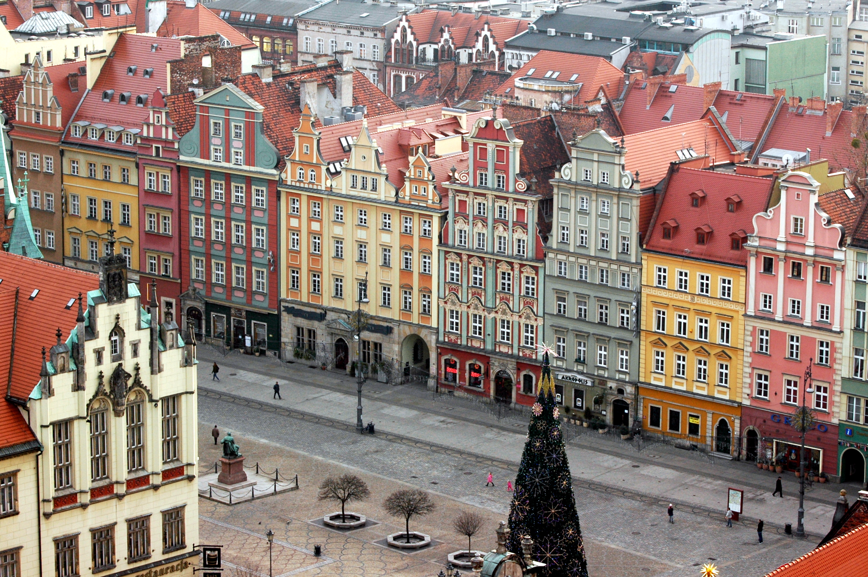 Rynek we Wrocławiu w 2015 roku